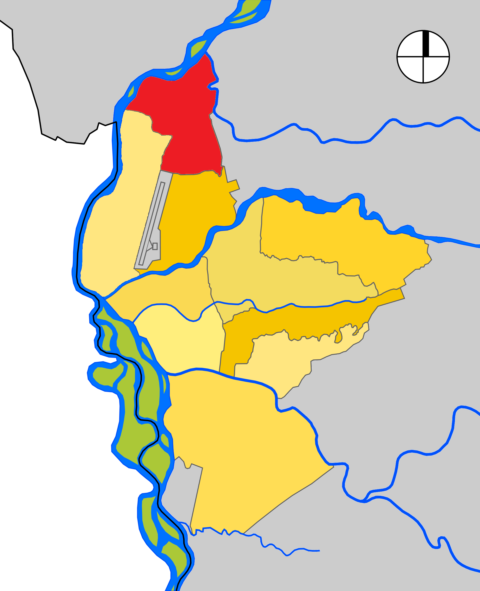 Mapa de las Comuna 9 de Neiva, departamento del Huila, Colombia.